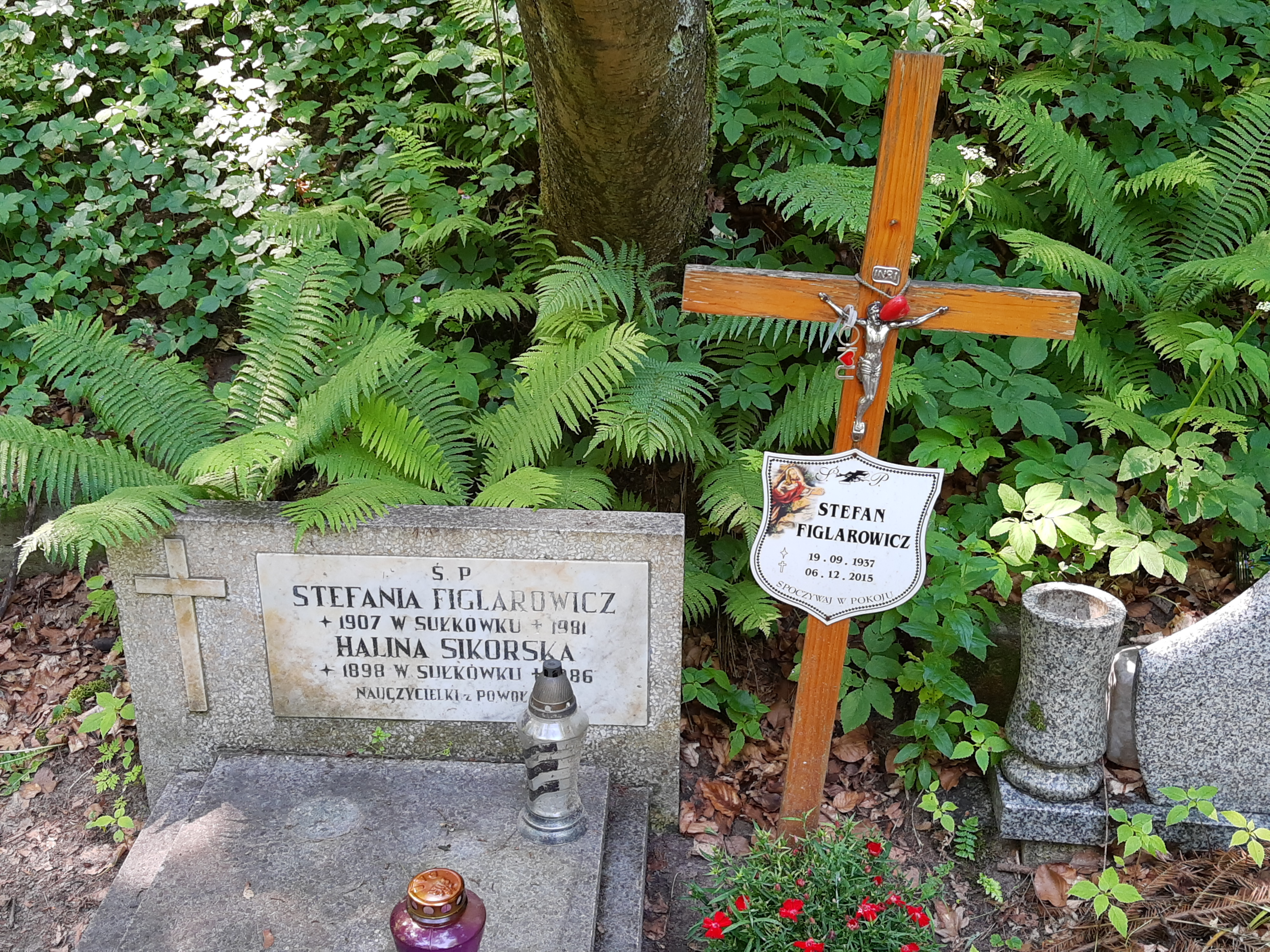 Grób Stefana Figlarowicza na Cmentarzu Srebrzysko